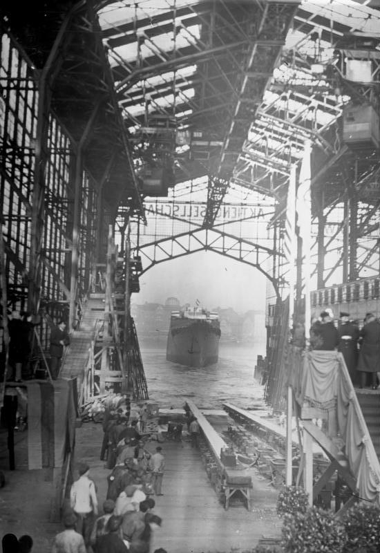 Der Stapellauf der Millionärs-Yacht Vanderbilt's! Auf der deutschen Germania-Werft in Kiel lief die Motor-Yacht "Alva" des amerikanischen Millionärs Vanderbilt glücklich vom Stapel. Die Yacht wird mit den modernsten Einrichtungen versehen sein.